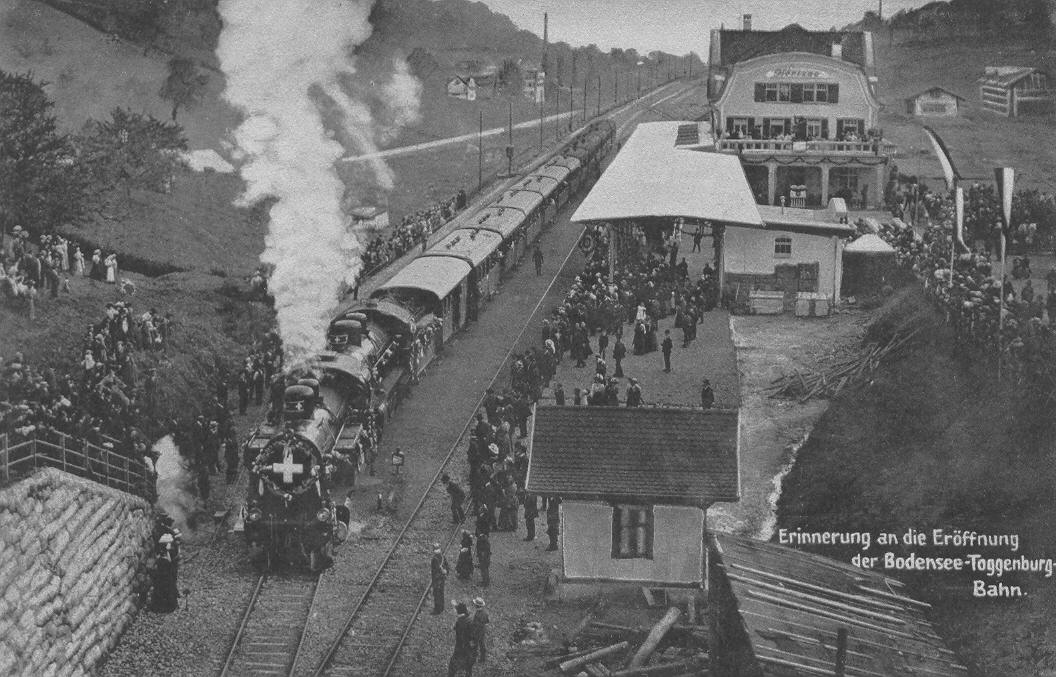 Eröffnungszug der Bodensee-Toggenburg-Bahn (BT) und der Rickenbahn (SBB) in Herisau. Es führt eine BT Eb 3/5, dahinter eine ebenfalls fabrikneue SBB A 3/5 603–616.